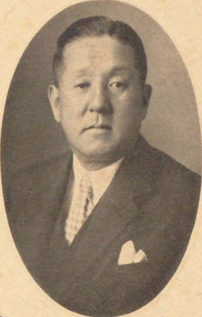 朝吹常吉 あさぶきつねきち